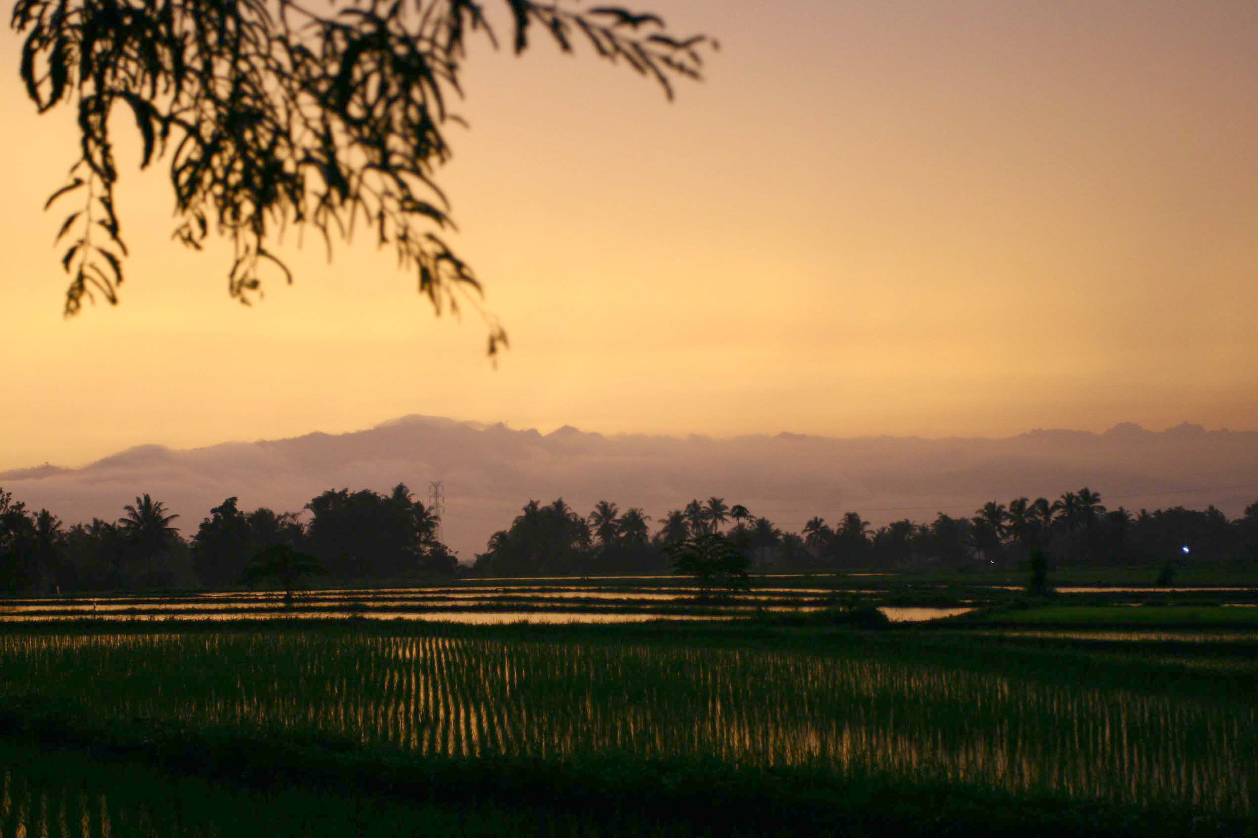 Pada waktu mau kembali ke rumah dari Yogya terjadi nuansa sore hari di sekitar Kalinegoro-Magelang. Tidak saya sia-siakan momen ini.